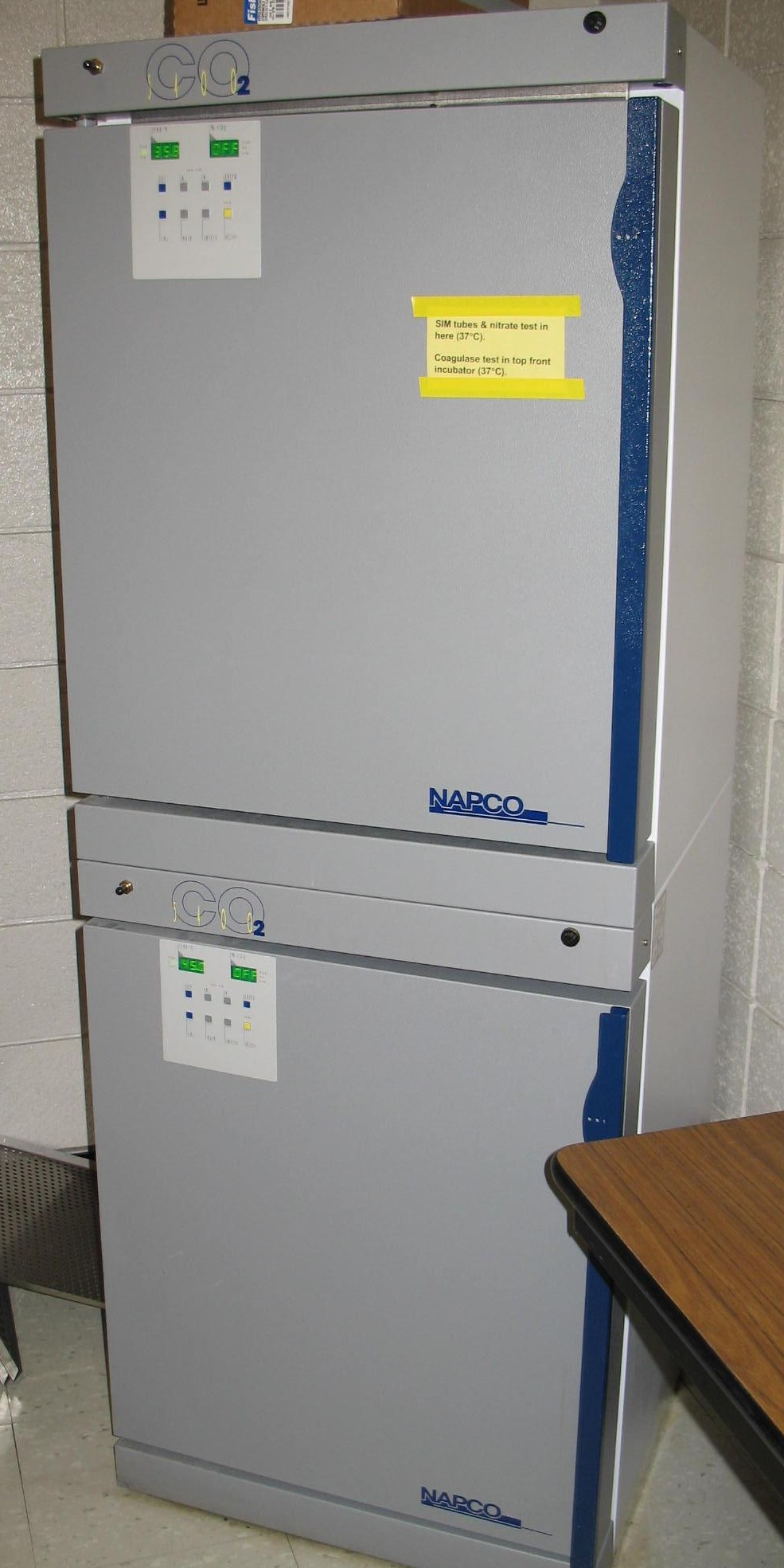 Inkubator używany do hodowli kultur bakterii w laboratorium mikrobiologicznym.